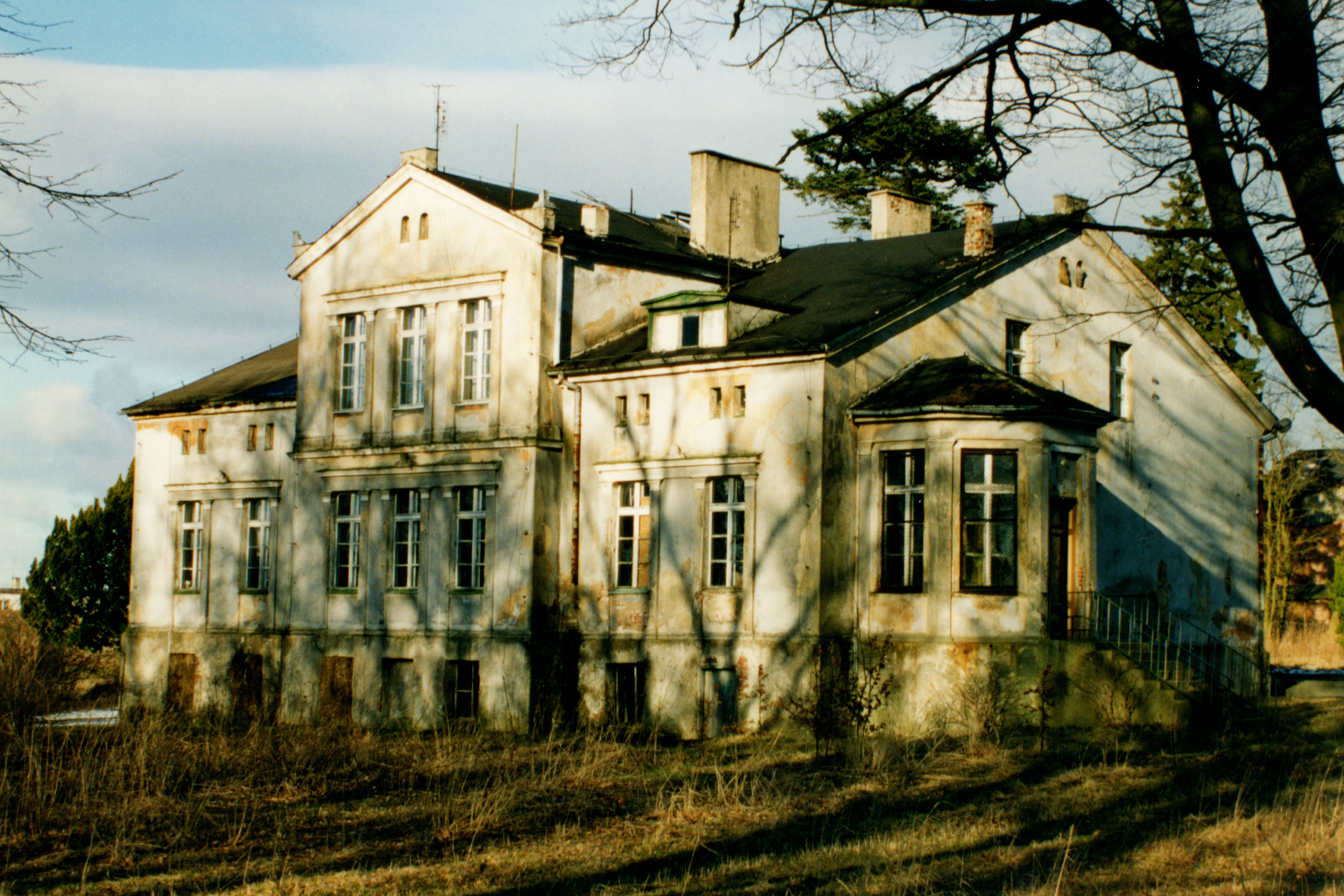 Choczewko - dwór, 2 poł. XIX